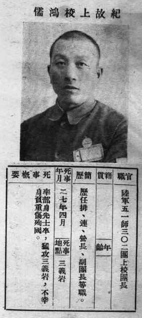 抗戰軍人忠烈錄第一輯中的烈士遺像